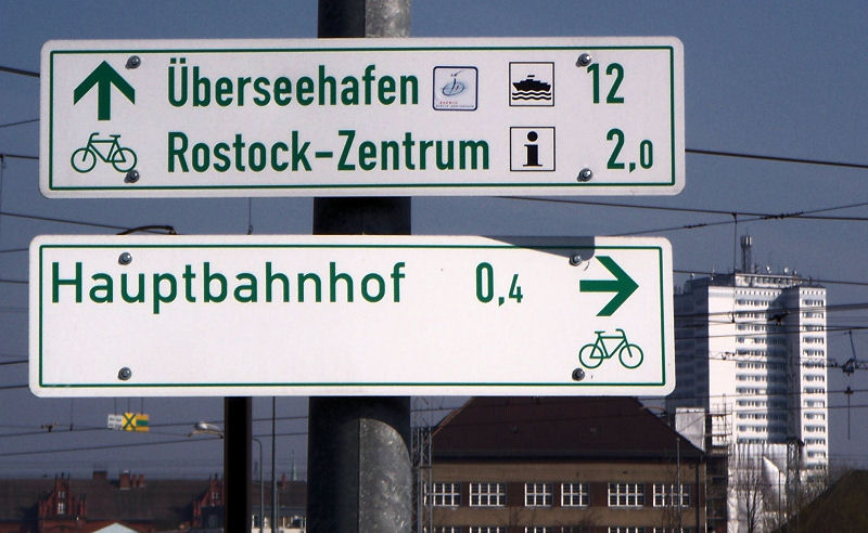 Wegweiser für den Radfernweg Berlin-Kopenhagen in Rostock